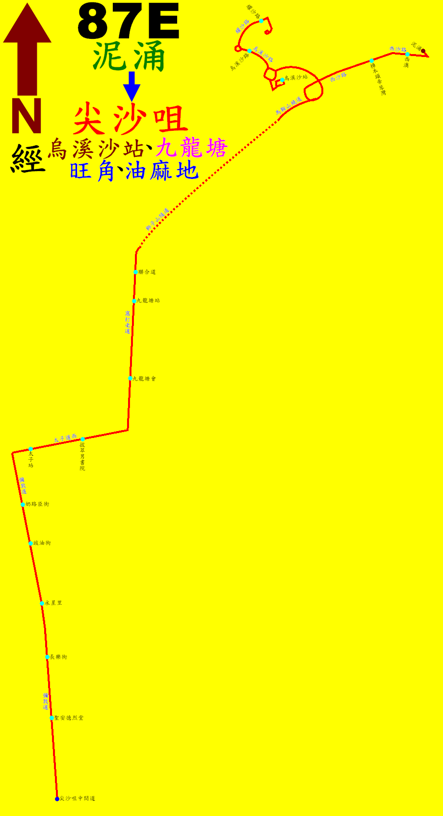 中文（香港）: 九巴87E線的走線圖